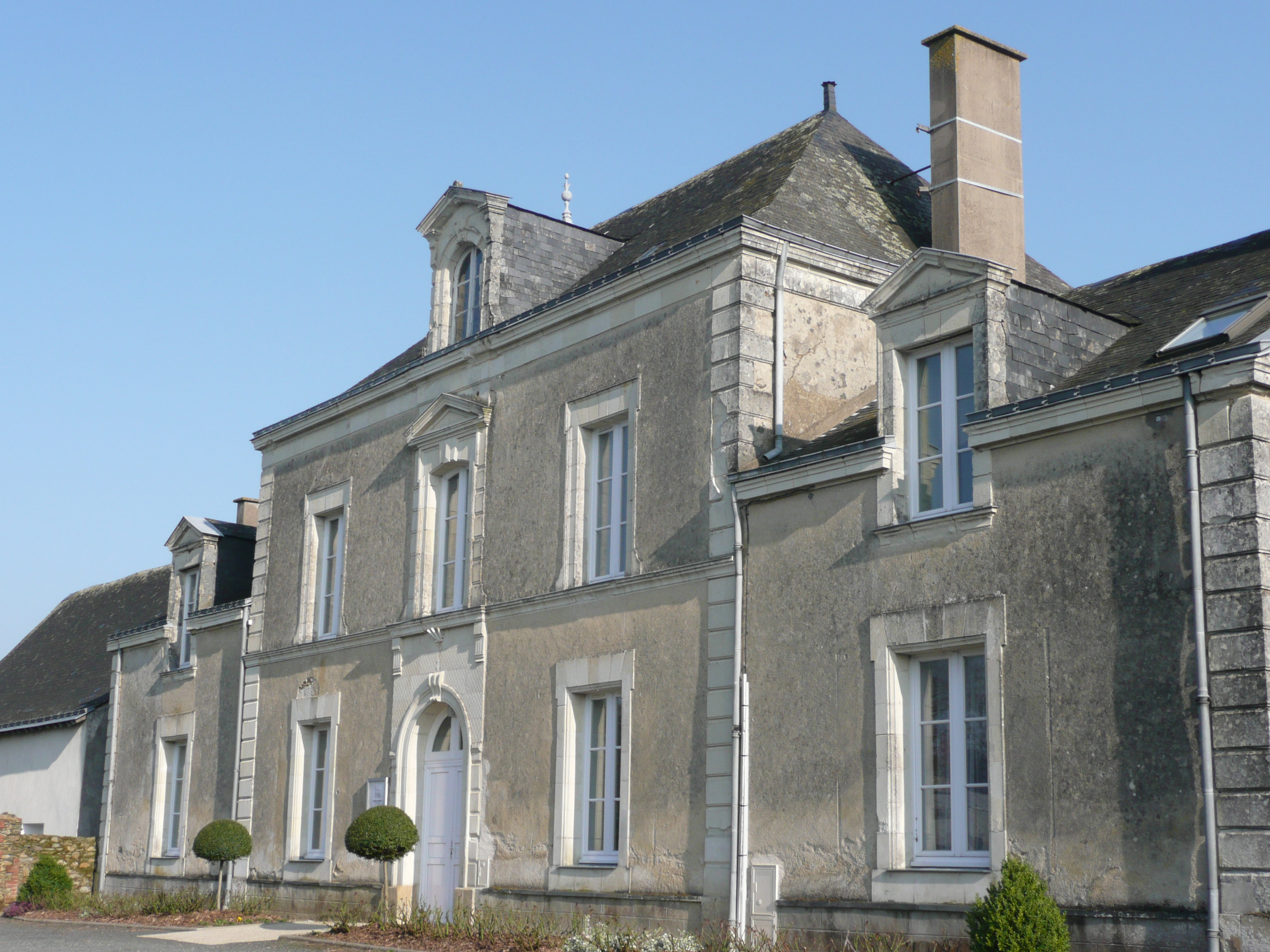 Mairie de Noëllet, en Maine-et-Loire.